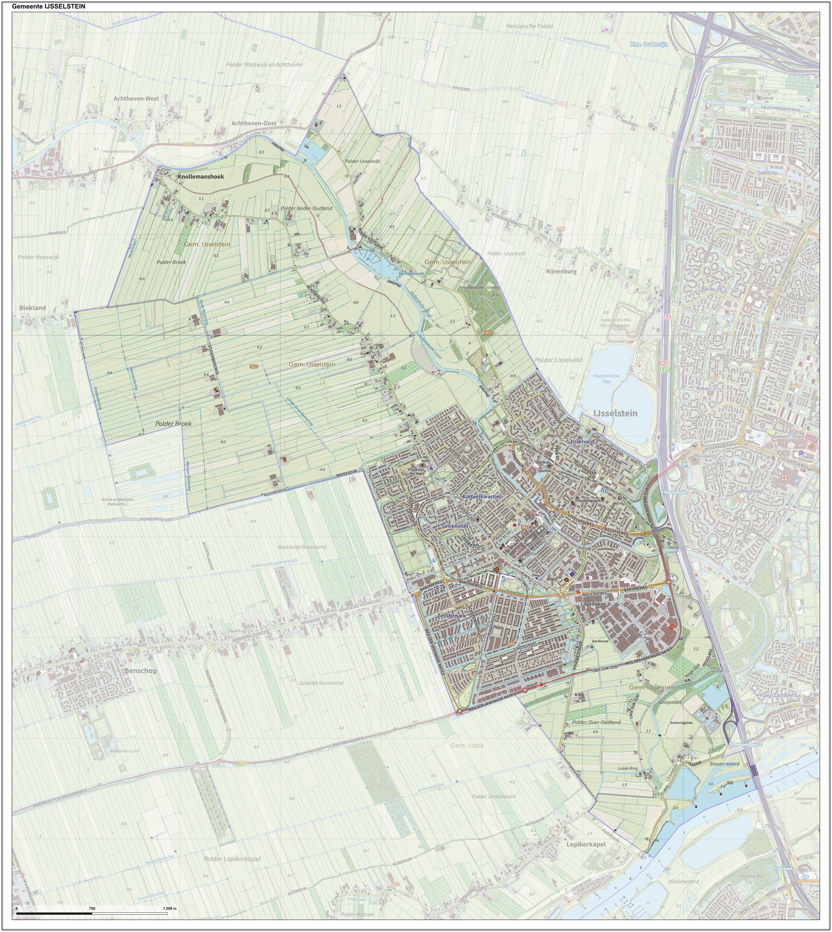 Topografische gemeentekaart. Resolutie: 400 pixels/km. Kaartbeeld samengesteld uit de open geodata van de Top10NL en Top25namen (Kadaster), Creative Commons-BY licentie. Gebouwvlakken uit open geodata BAG extract. Wegen uit de OpenStreetMap, OpenStreetMap community. Reliëfschaduw uit de Actuele Hoogtekaart AHN2. Samenstelling en kleurenschema: Jan-Willem van Aalst, met QGIS. Zie ook de Legenda.